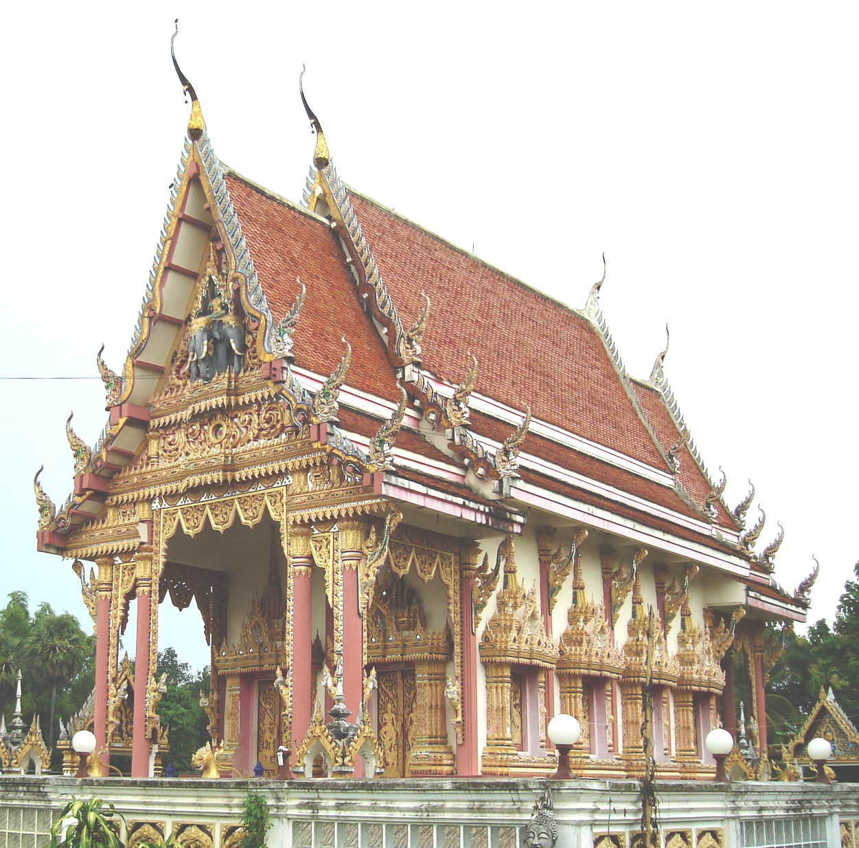 วัดใหม่เจริญธรรม (อุตรดิตถ์) บ้านคุ้งตะเภา ตำบลคุ้งตะเภา อำเภอเมืองอุตรดิตถ์ จังหวัดอุตรดิตถ์.